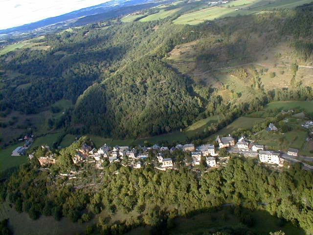 Rodelle (Aveyron) Source image originale : Statut Xavier Bonnafous